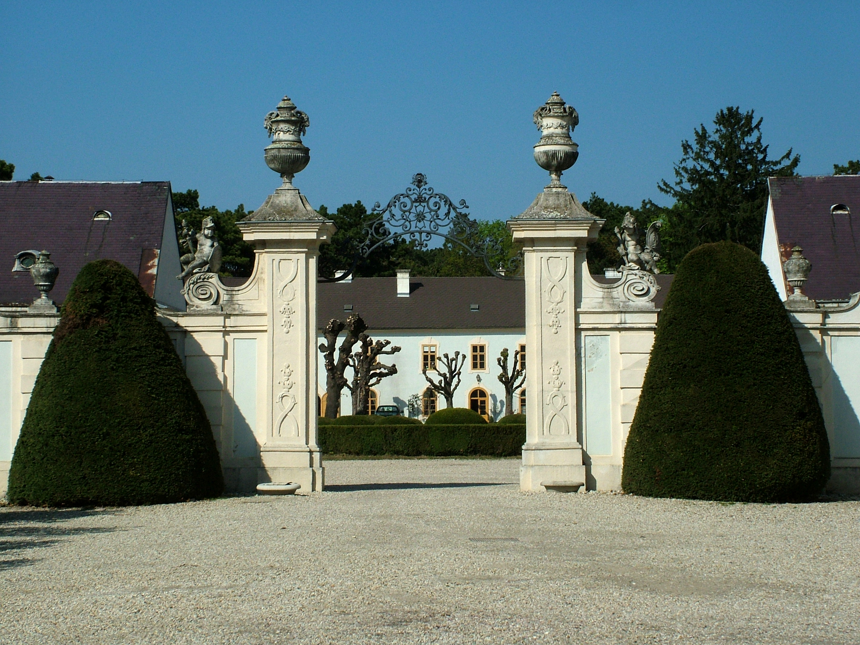 Halbturn (Féltorony), Harrach-kastély, belső udvar (Ausztria)